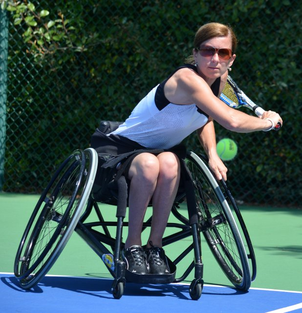 Henriett Koósz bei den Pensacola Open 2012